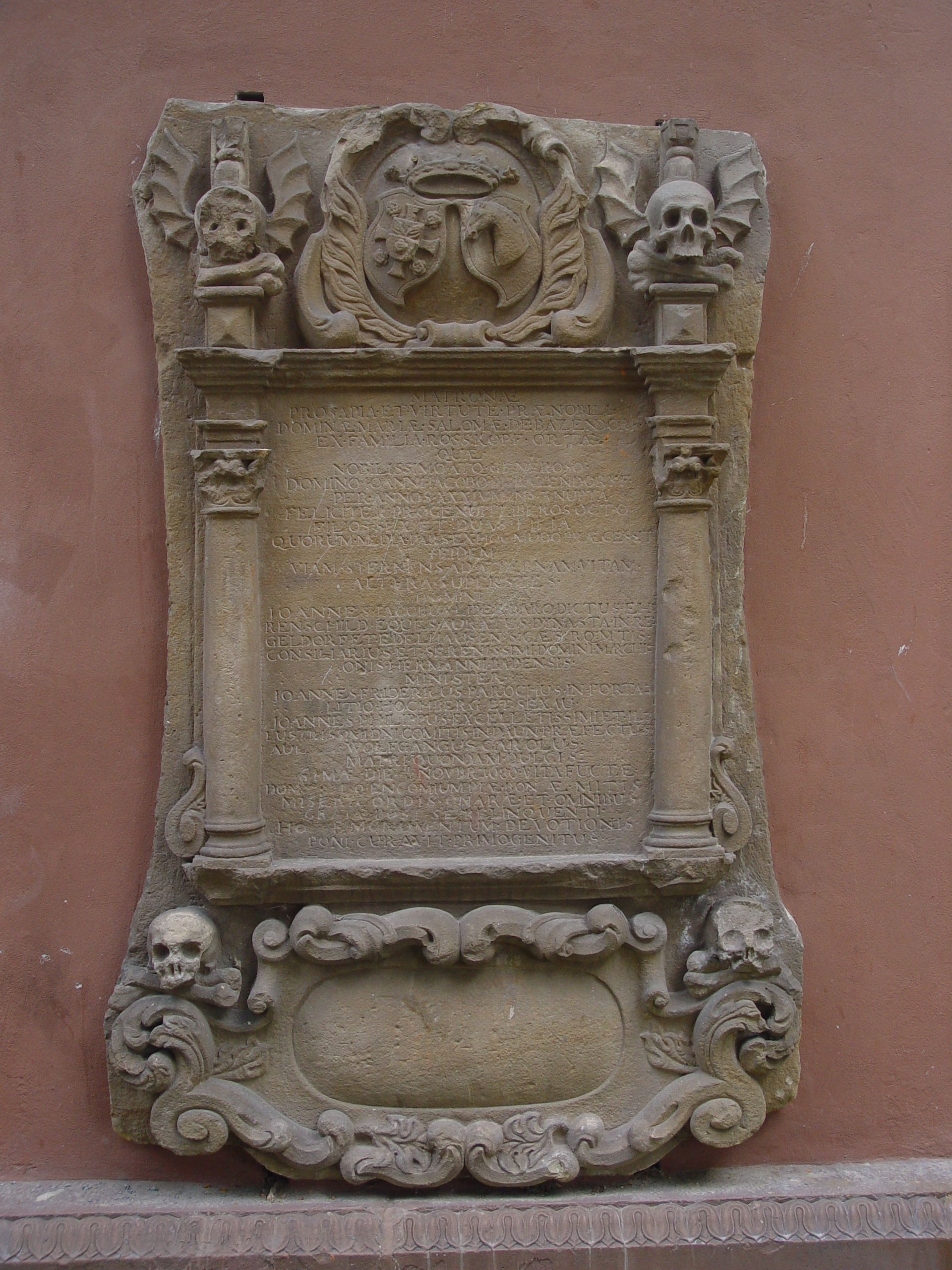 Grabplatte I